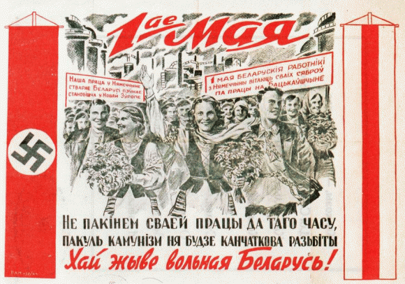 Нацысцкі плакат да 1-ае мая. "Не пакінем сваей працы да таго часу, пакуль камунізм ня будзе канчаткова разьбіты. Хай жыве вольная Беларусь!". "Наша праца ў Нямеччыне стварае Беларусі пэўнае становішча ў Новай Эўропе". "1 мая беларускія работнікі з Нямеччыны вітаюць сваіх сяброў па працы на Бацькаўшчыне"